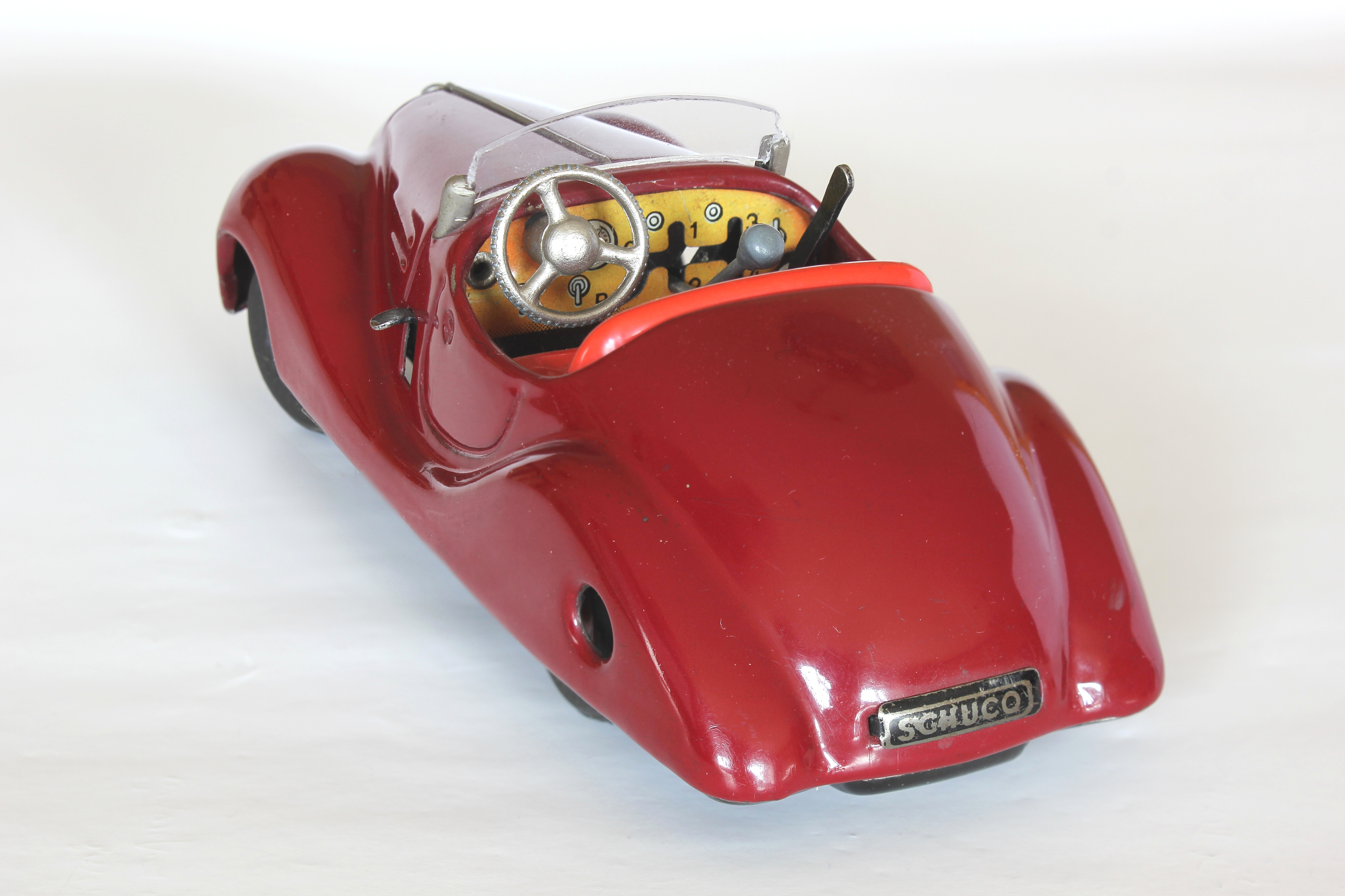 Schuco Examico 4001, made in U.S.-Zone Germany, um 1948. Spielzeugauto mit Uhrwerk, Viergangschaltung, Kupplung (schwarze Taste links außen) Lenkung, Handbremse